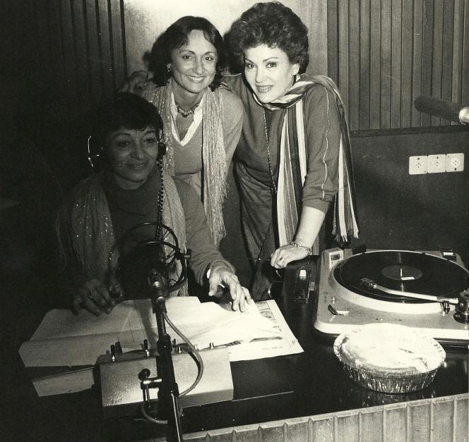 "(ריקה זראי, רחל הרמתי ורבקה מיכאלי באולפן "ביקור בית (תוכנית רדיו